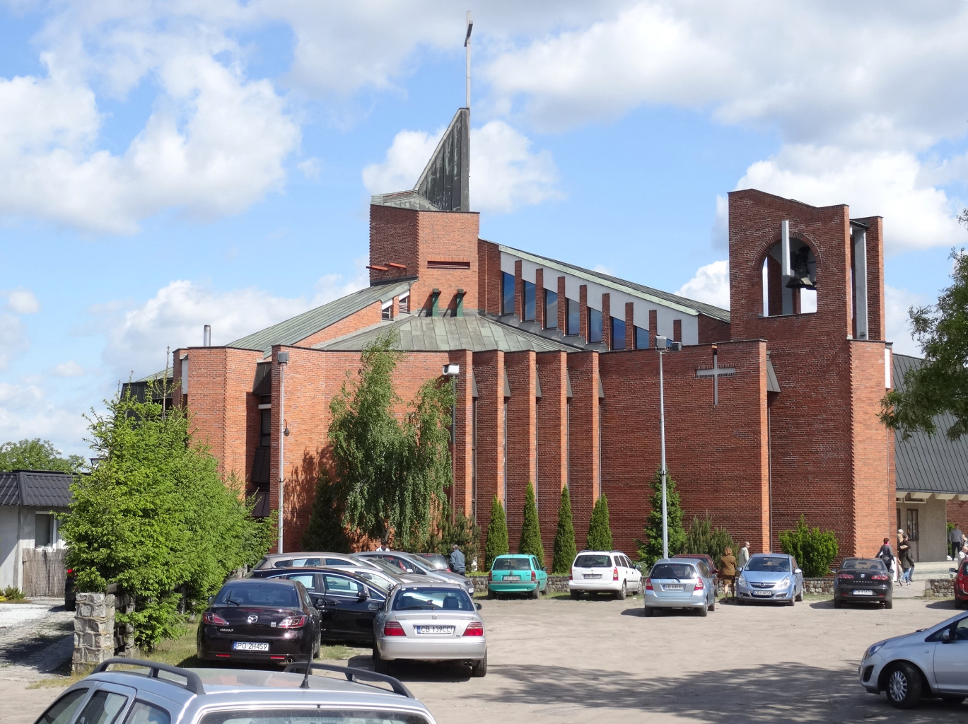 Kościół parafialny św. Maksymiliana Kolbe, ul. Kolibrowa 5 w Bydgoszczy, na osiedlu Osowa Góra